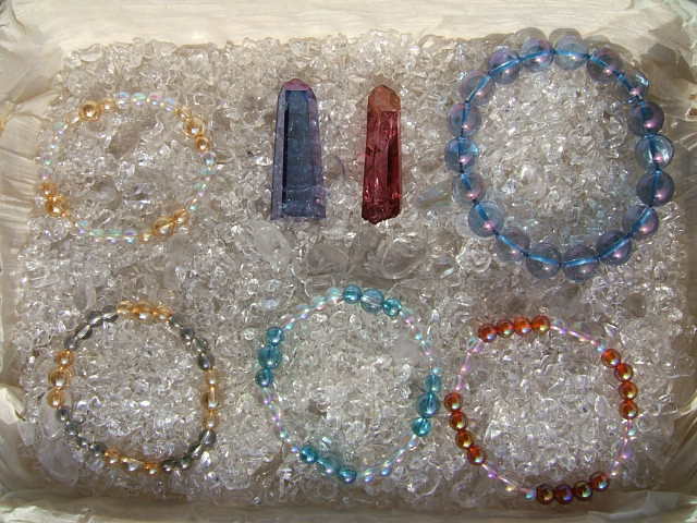 さまざまなオーラクリスタルの写真